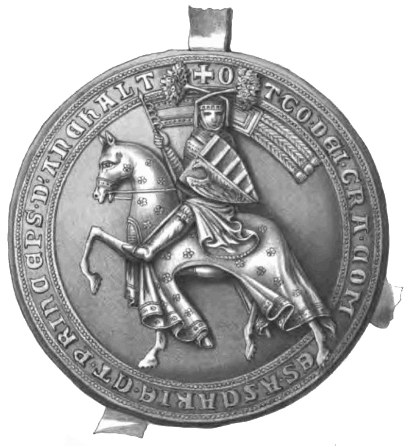 Drittes Reitersiegel des Fürsten Otto I. bzw. Reitersiegel des Fürsten Otto II. von Anhalt (Original veröffentlicht im Codex diplomaticus anhaltinus, Band 2)